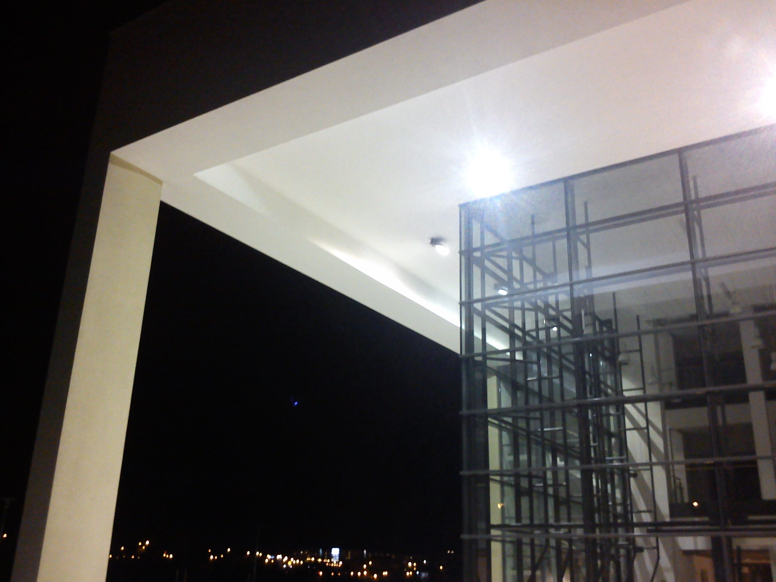 Biocentrum, Poznań, ul. Dojazd.